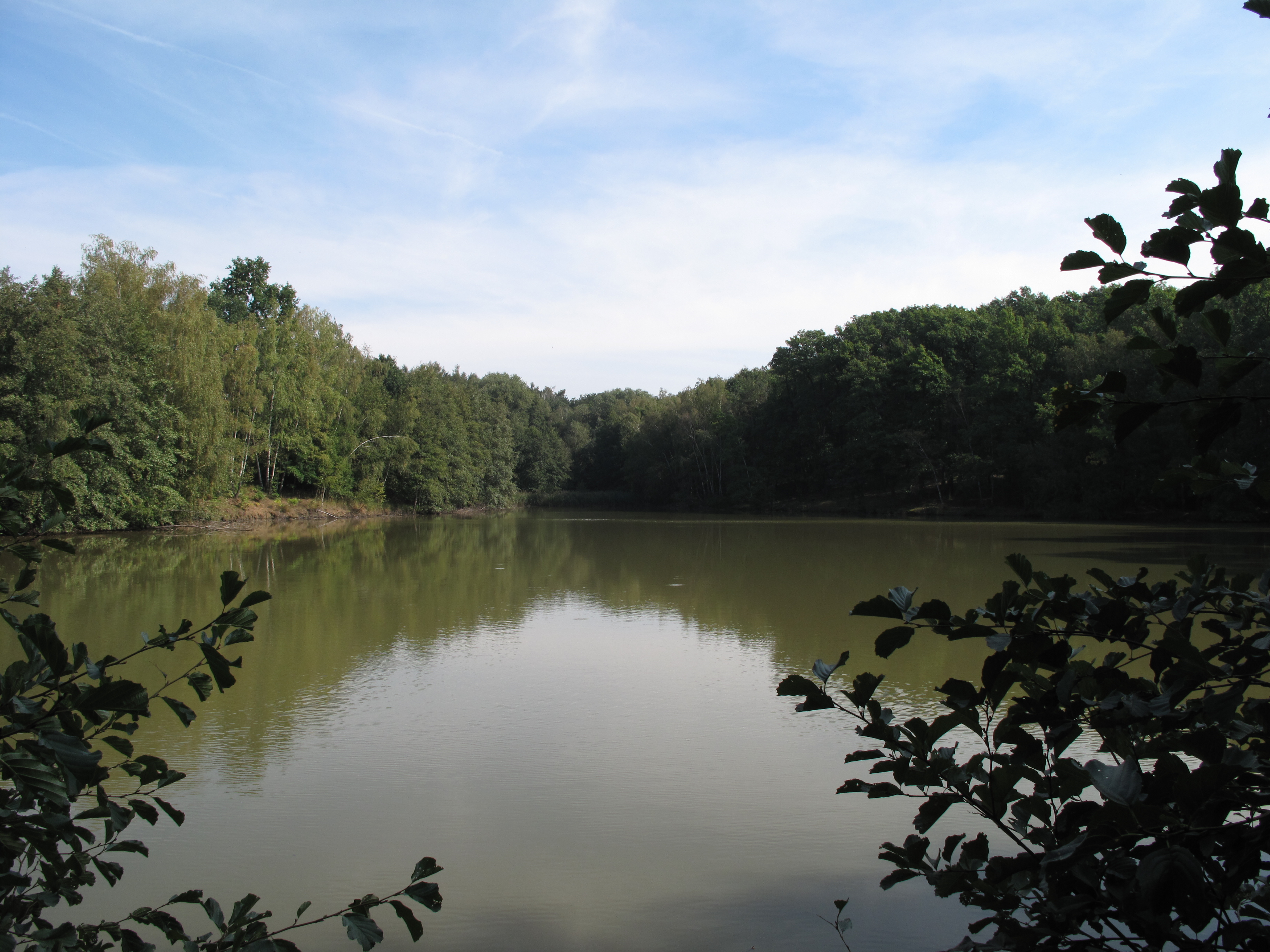 Barbora. Praha, Česká republika.